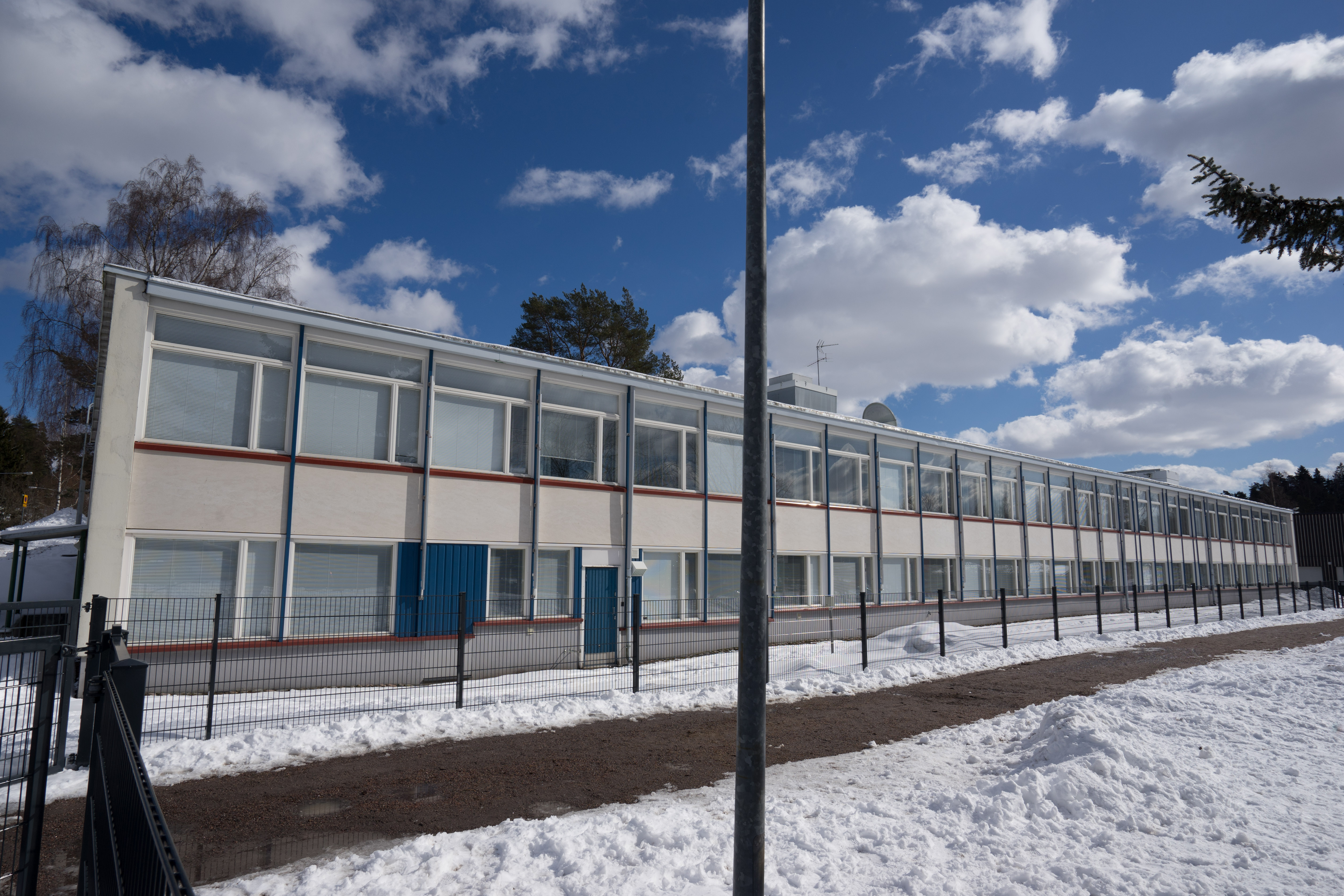 Ulkotilat